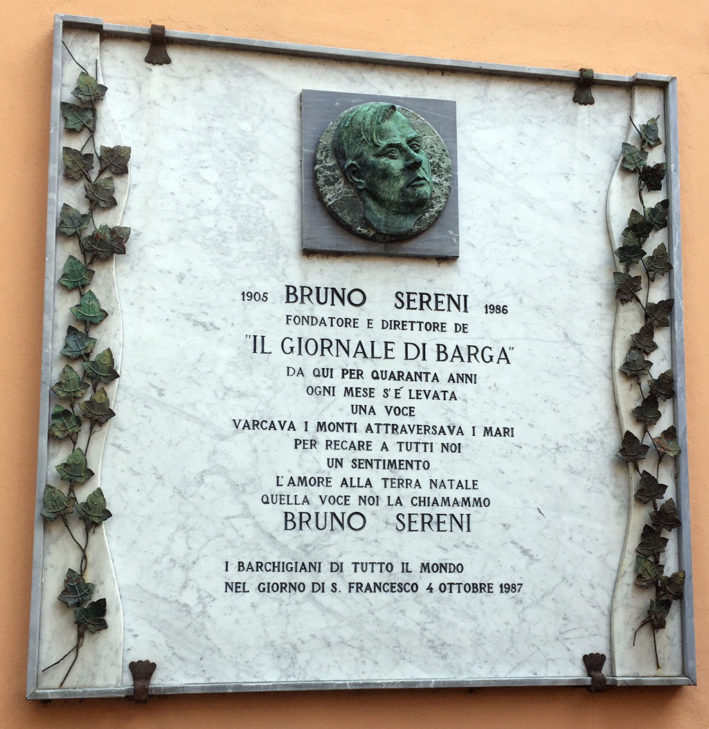 Lapide commemorativa di Bruno Sereni, direttore de Il Giornale di Barga, a Barga (provincia di Lucca), via di Borgo